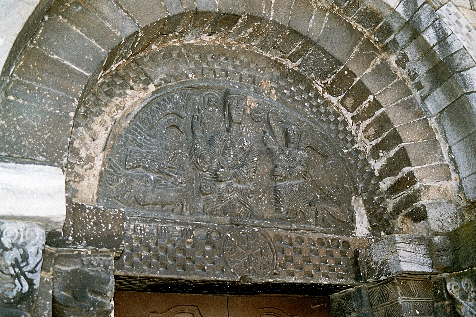 Espagne - Val d'Aran - Église de l'Assomption de Bossòst